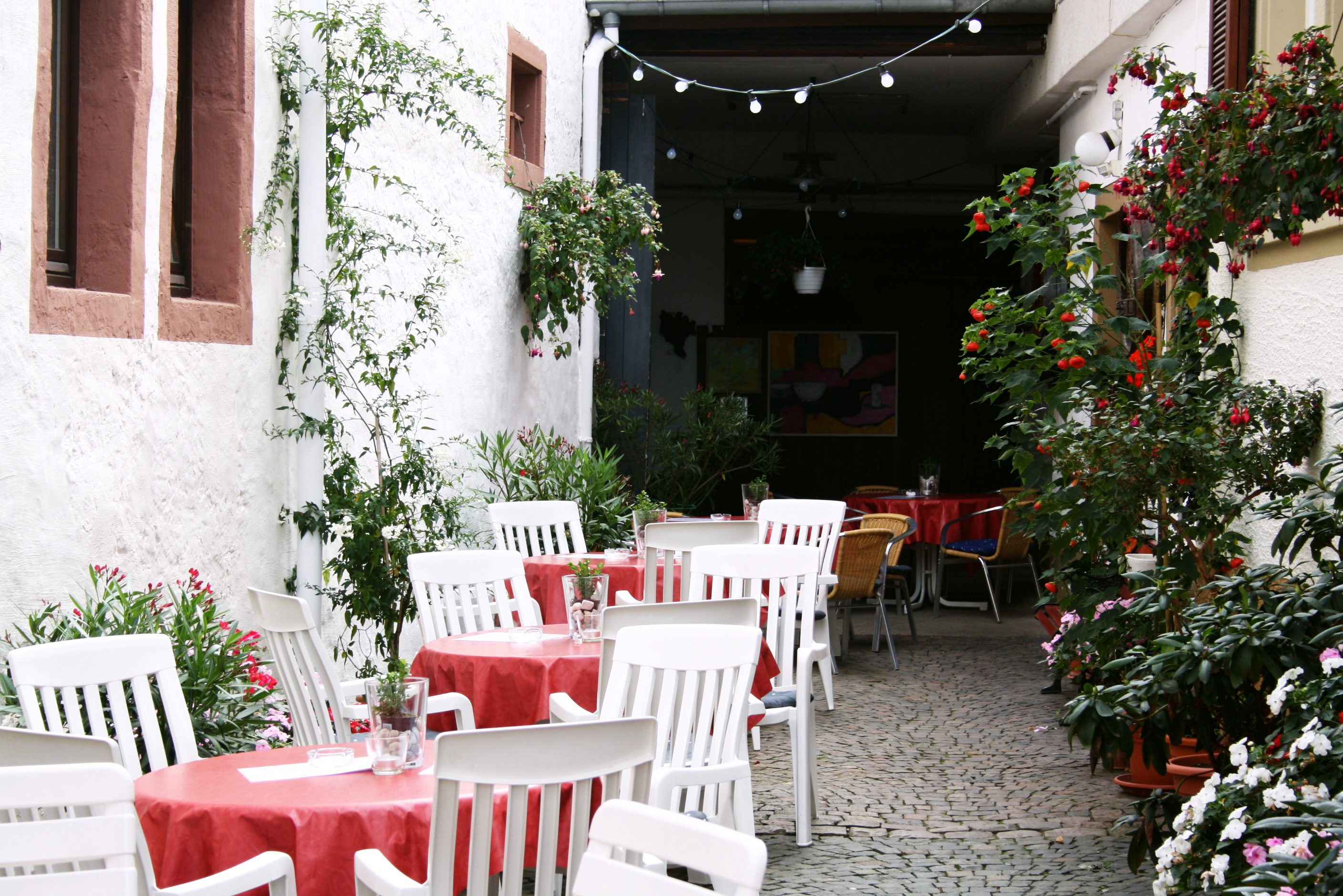 Typische Straußenwirtschaft in der Theresienstraße in Rhodt.